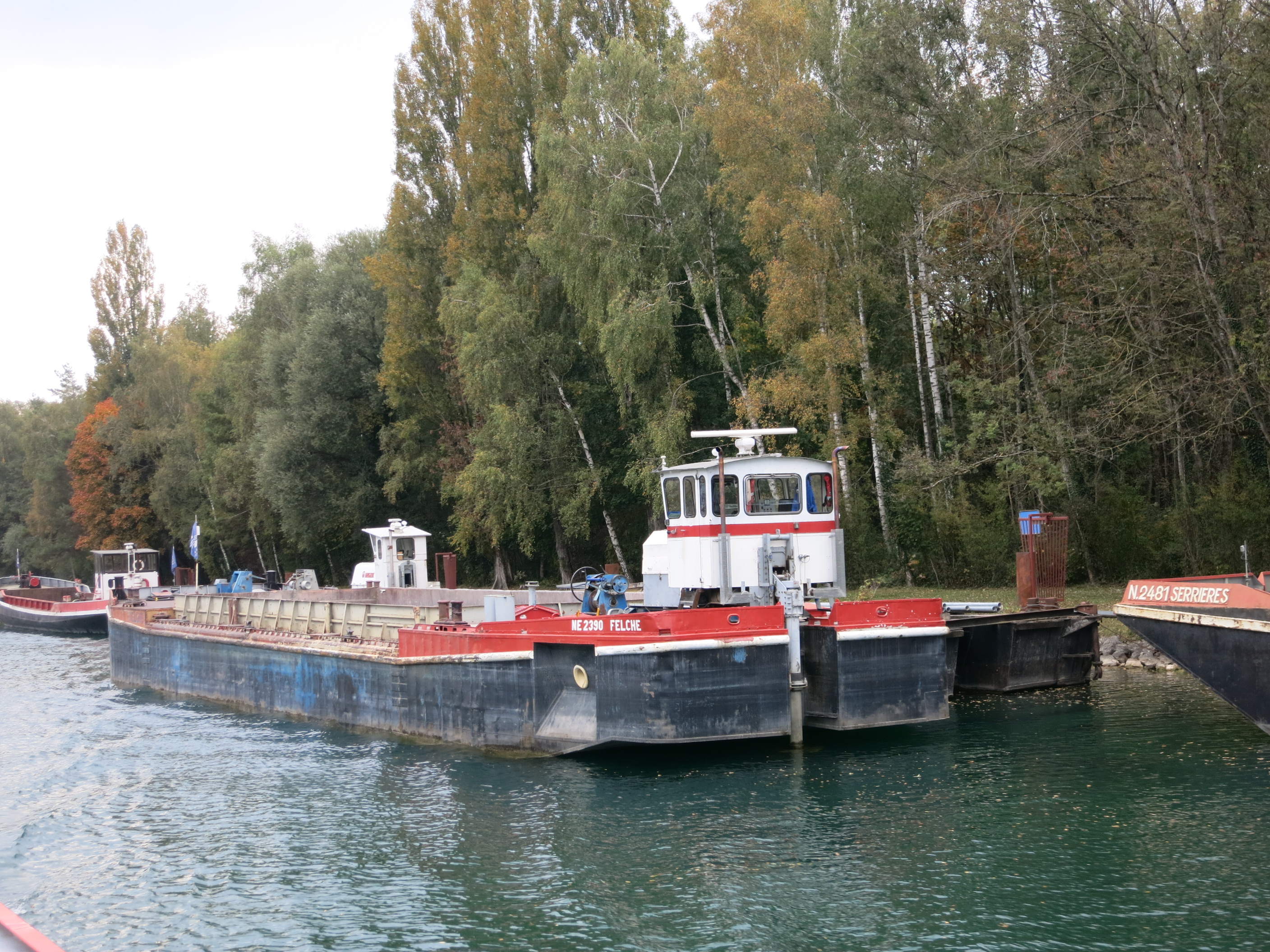 Zihlkanal NE/BE, Schweiz